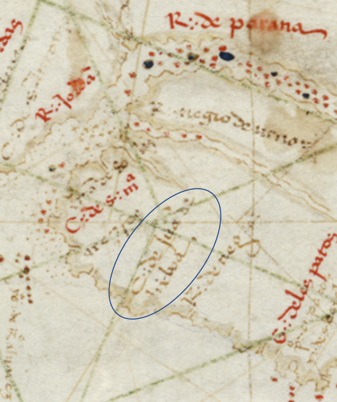 El cabo de Juan de Lisboa (escrito "C: de Jua[n] de / lixboa") en el planisferio de Diego Ribero de 1529 actualmente conservado en el Vaticano.